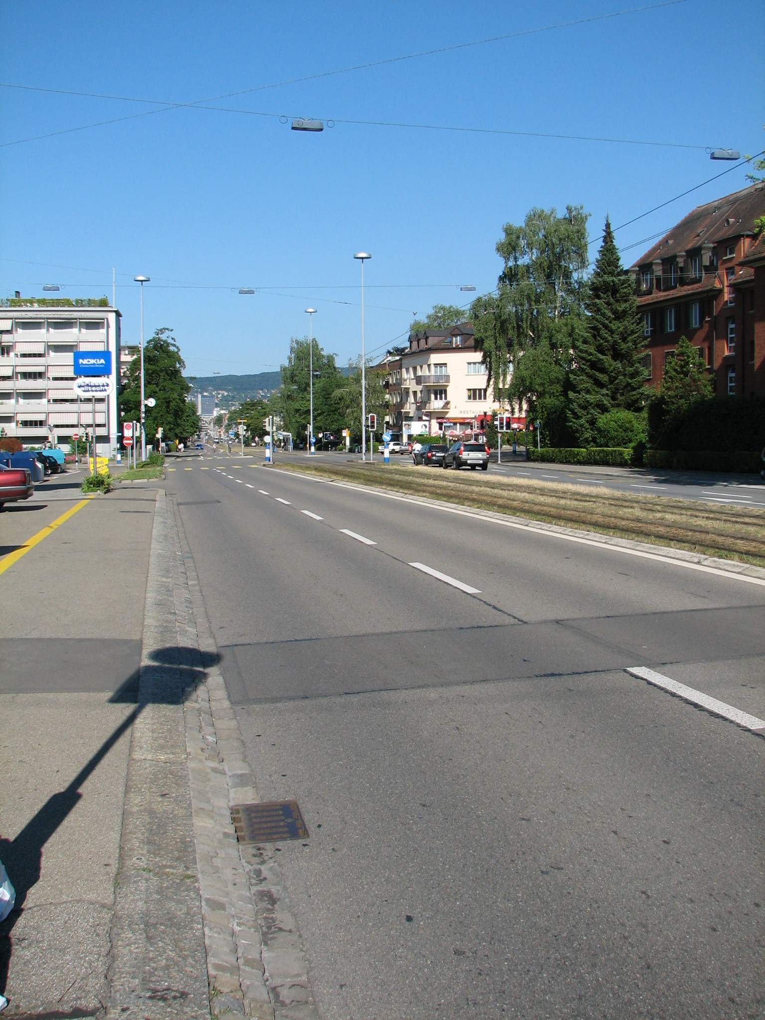 Blick auf die Birmensdorferstrasse stadteinwärts, auf Höhe der Hausnummer 444